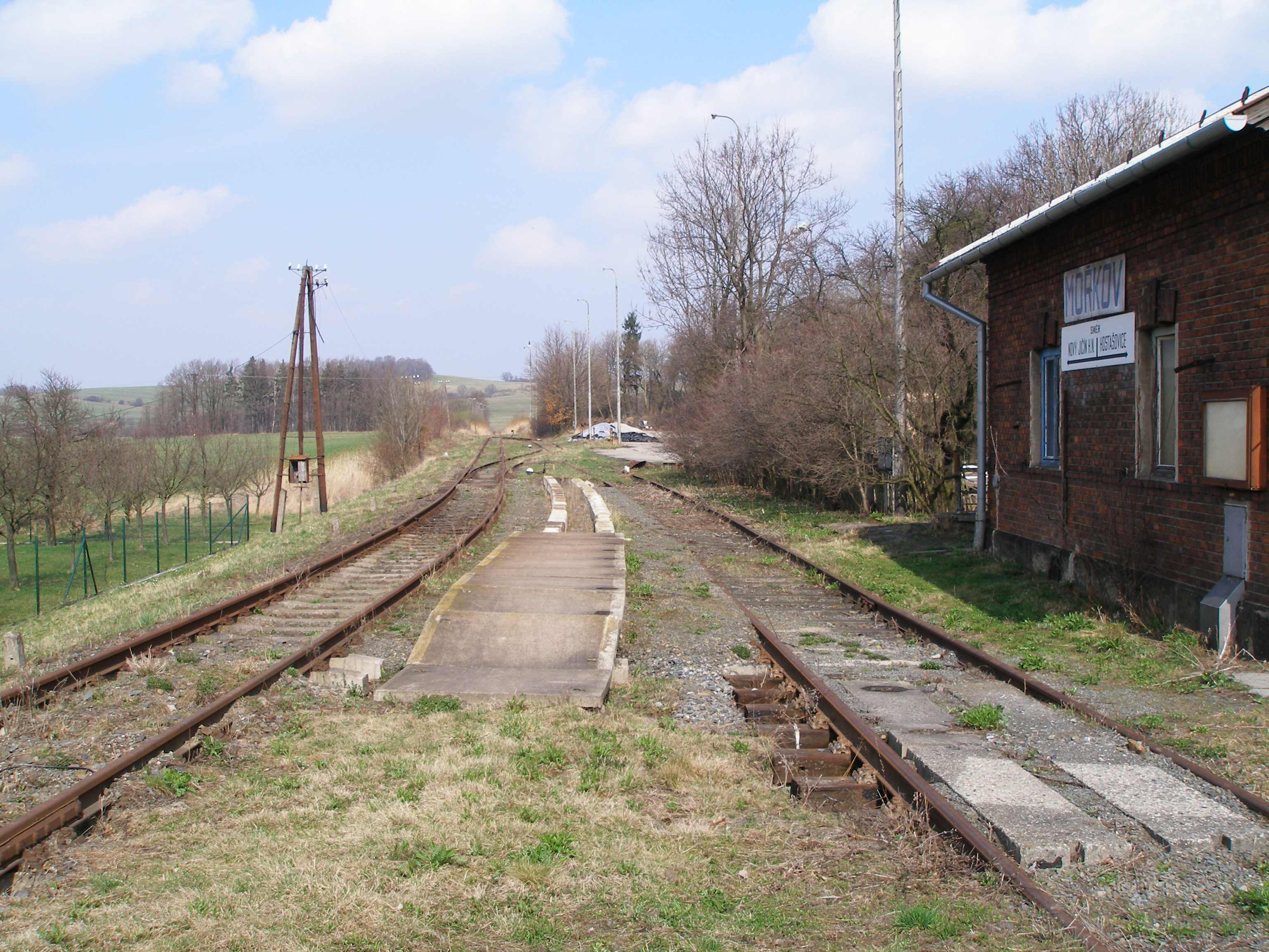 Zrušená železniční zastávka Mořkov - pohled na kolejiště severním směrem.